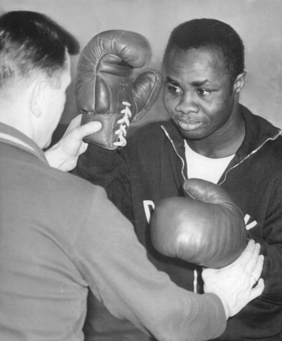 Leipzig, DHfK, Boxtraining Zentralbild Kluge At. 20.4.1965-Leipzig: Ghanas Boxer studieren an der DHfK. Prominentester Teilnehmer eines Trainerlehrganges an der DHfK Leipzig ist der ghanische Boxer Eddie Blay (rechts), der bei den Olympischen Spielen in Tokio die Bronzemedaille im Halbweltergewicht gewann. Ajuch ein Medaillen-Gewinner lernt nie aus. Der Leiter der Fachgruppe Boxen an der DHfK, Kurt Wagner (links), korrigiert die Deckung. Information: In dem achtmonatigen Lehrgang, der im November 1965 beendet wird, werden den ausländischen Sportlern Kenntnisse in der jeweiligen Spezialsportart, sowie in der Sporttheorie vermittelt.